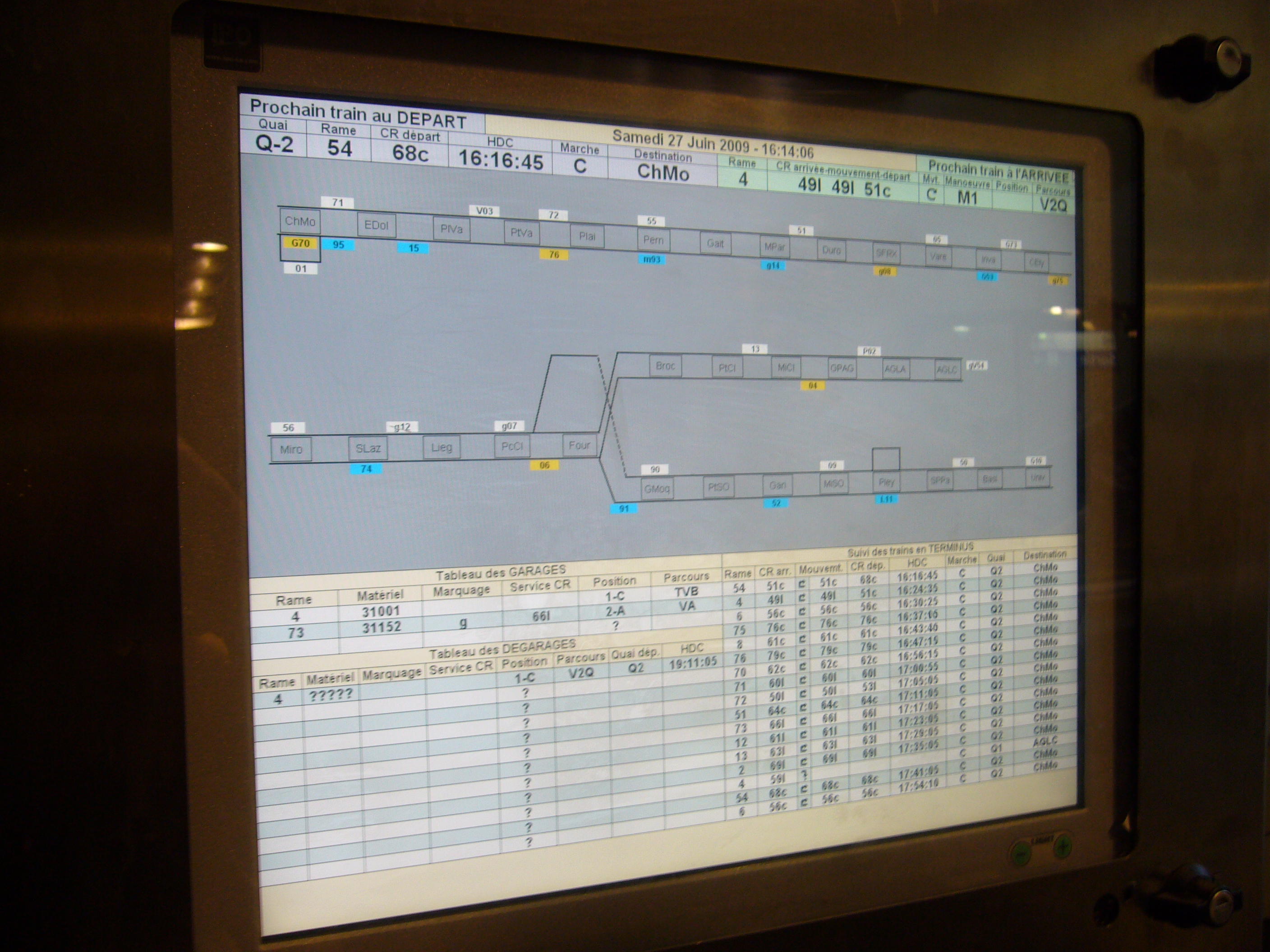 Écran de gestion du trafic du système Ouragan au terminus Les Courtilles de la ligne 13.